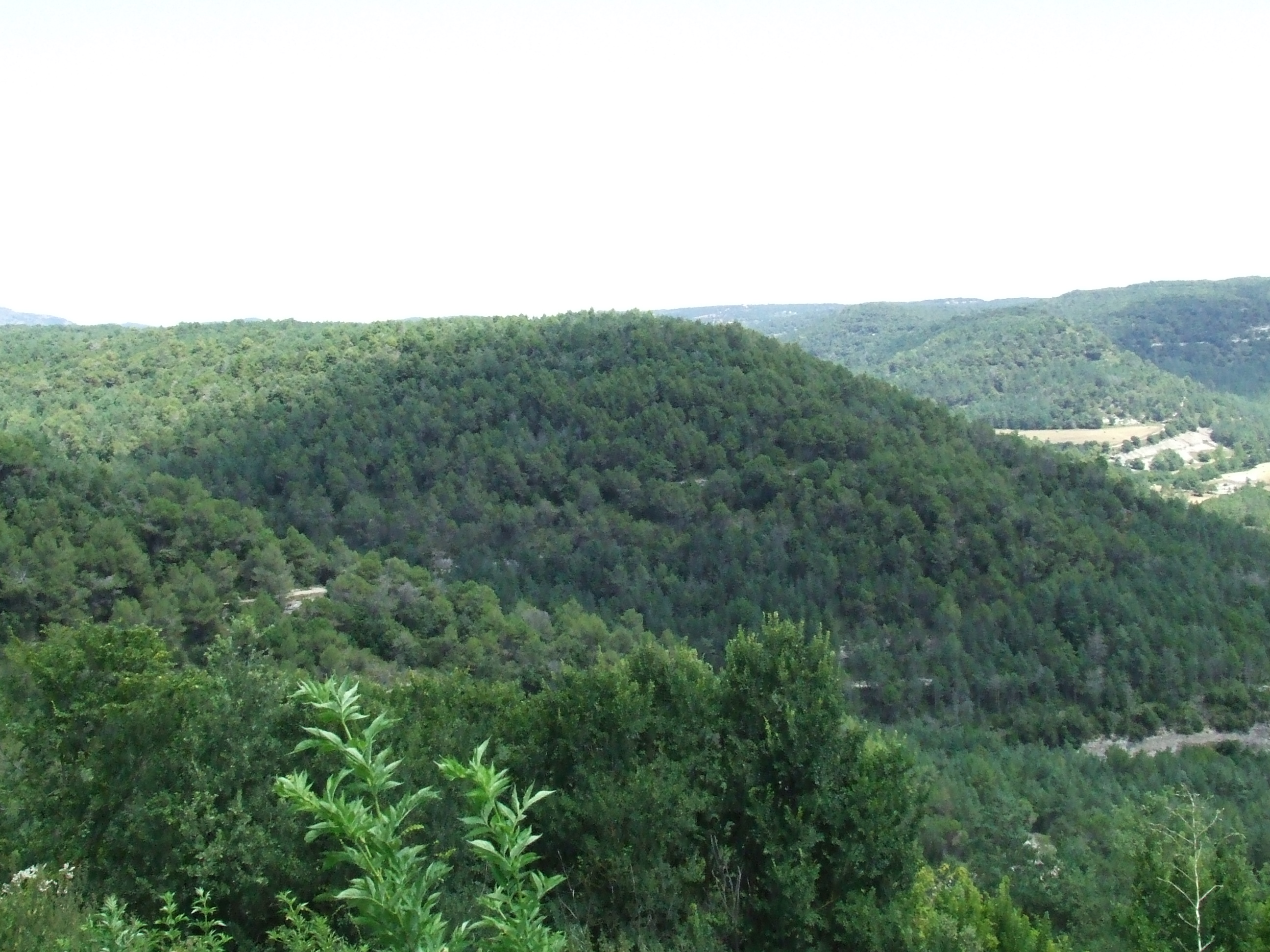 El Turó de Vilacís (Castellcir, Moianès)